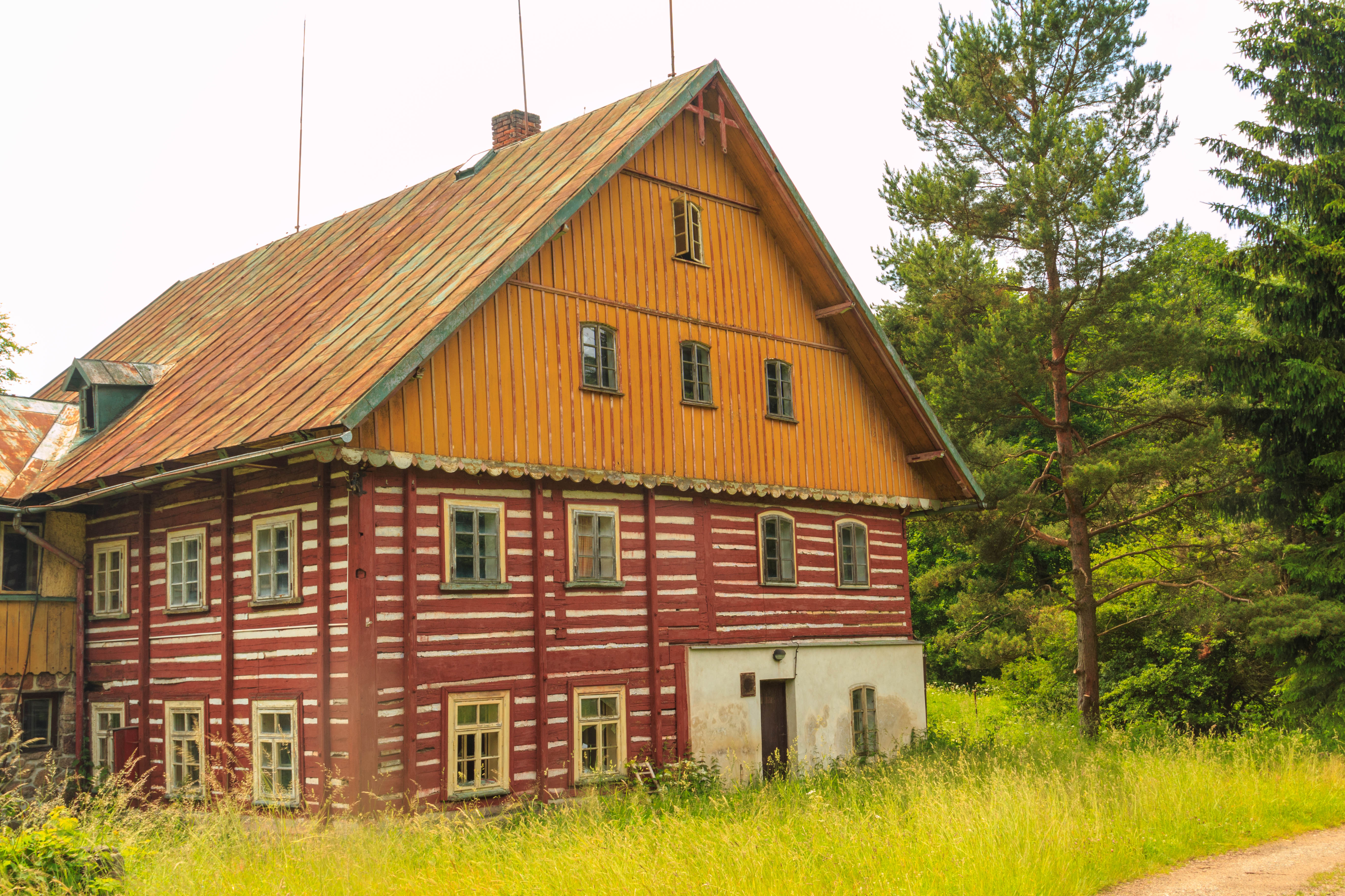 Čížkův mlýn